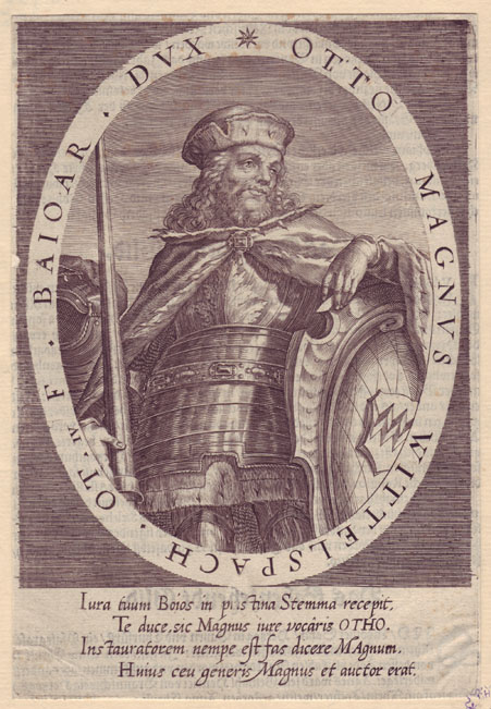 Otto I. von Bayern (1117–1183). Kupferstich 145 * 118 mm.